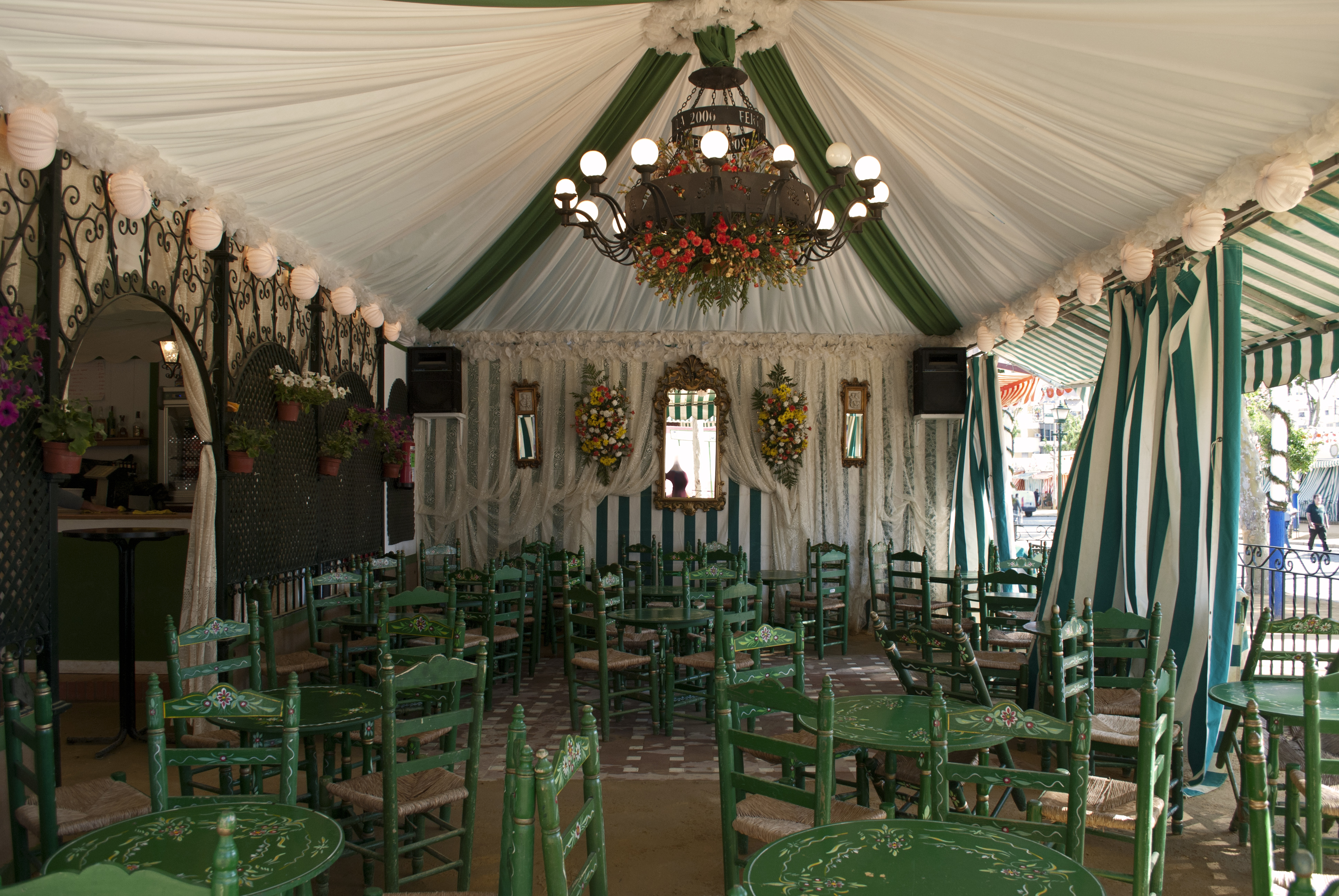 Interior de una caseta de la feria de abril 2009, a primeras horas de la mañana.